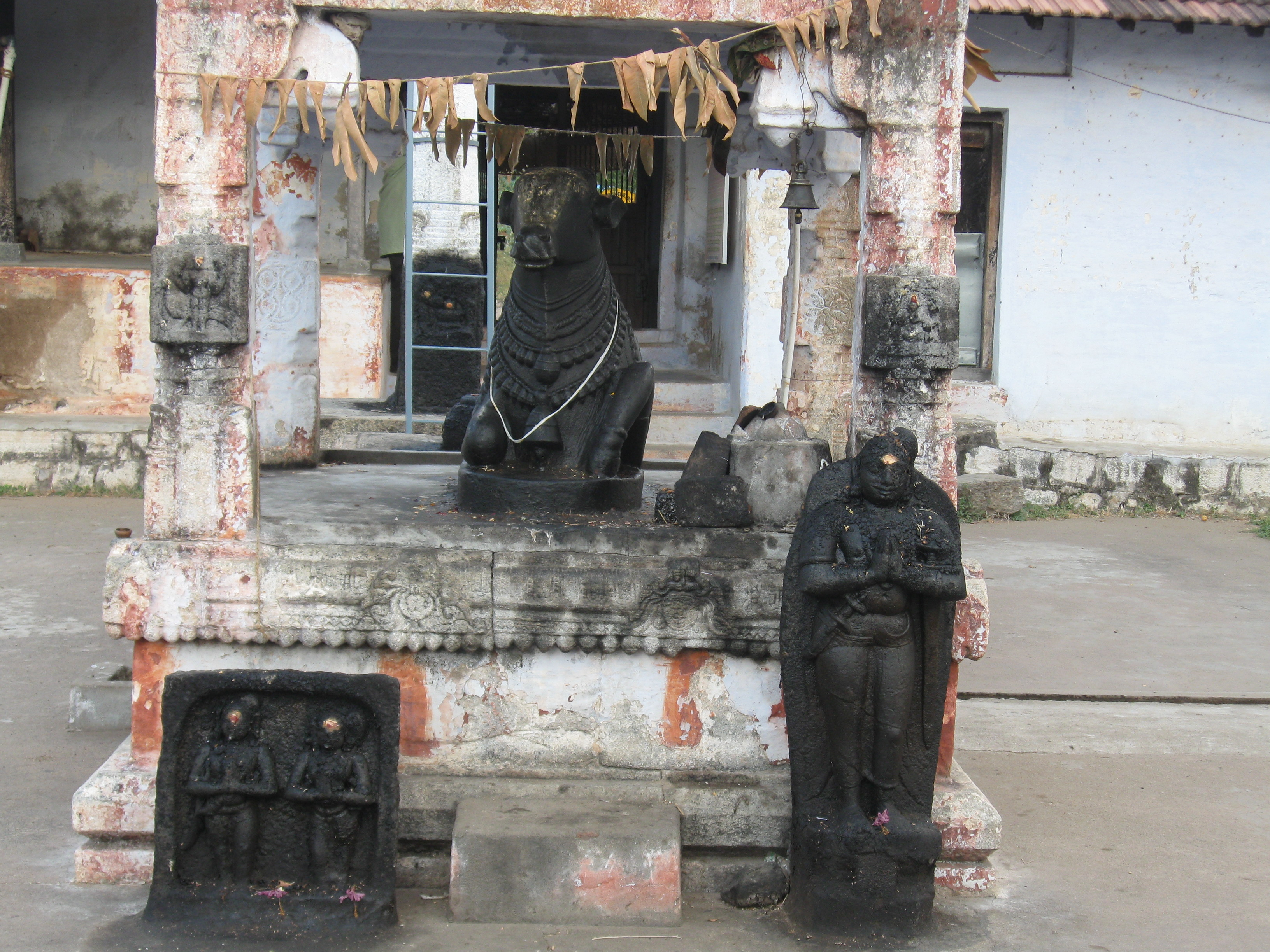 வல்வில் ஓரி சிலை, திருவேசுவரர் ஆலயம், சிங்களாந்தபுரம். நாமக்கல் மாவட்டம்